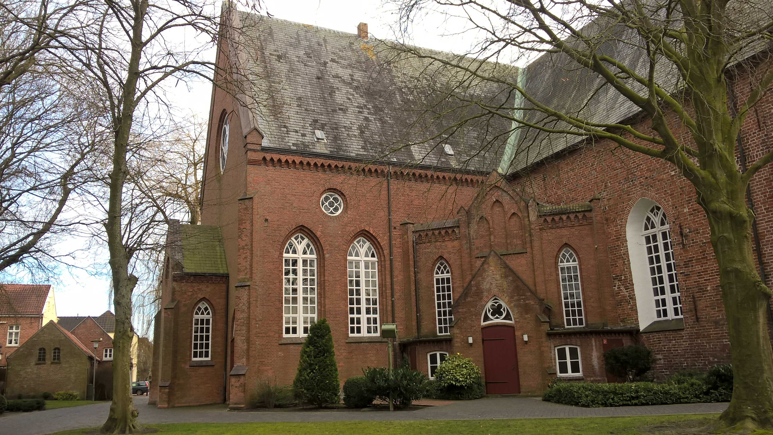 Nordwesten der Georgskirche in Weener, Ostfriesland, Niedersachsen, Deutschland